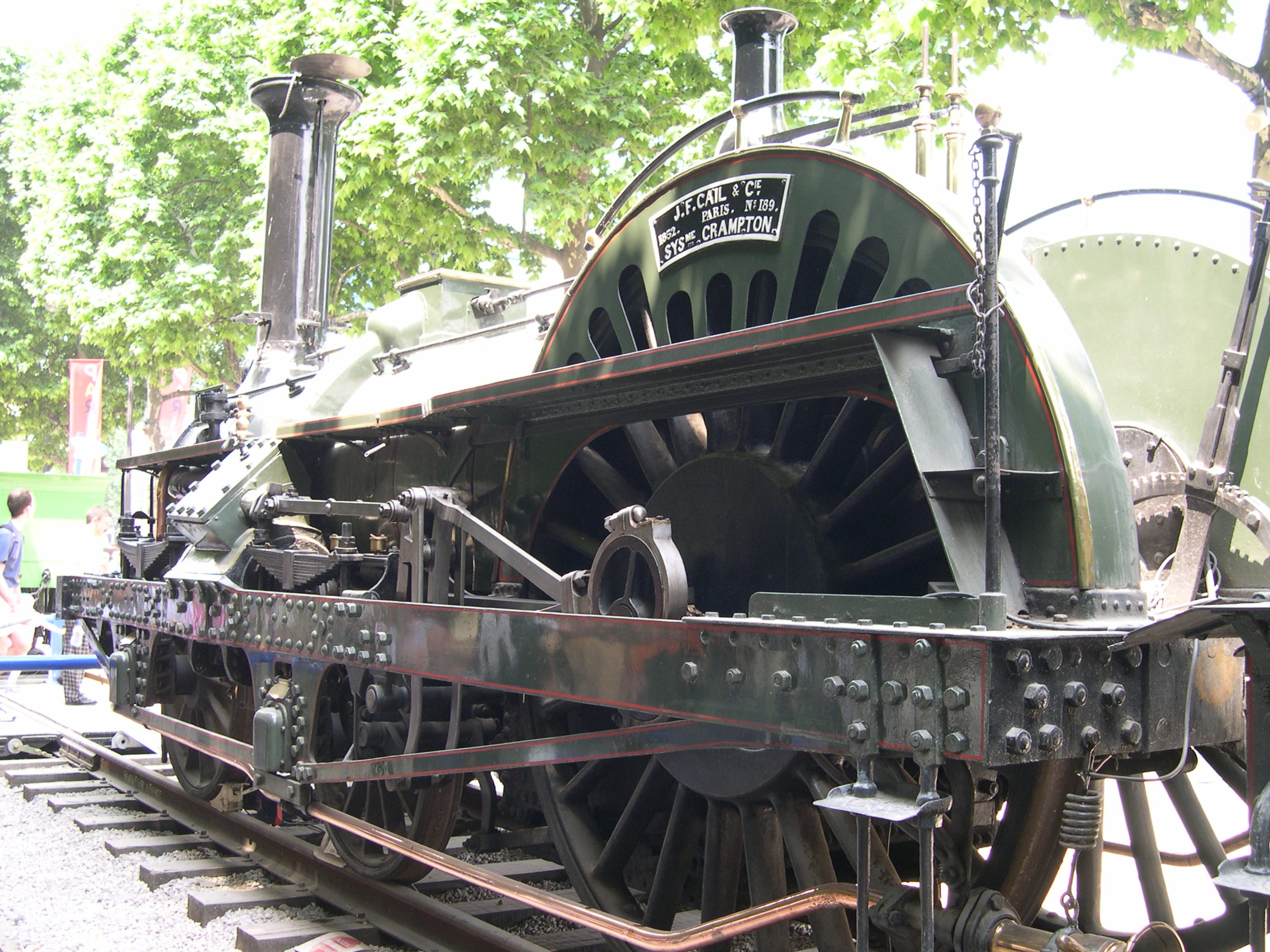 France Paris Champs Élysées Expo Train capitale 2003 Locomotive Crampton 80